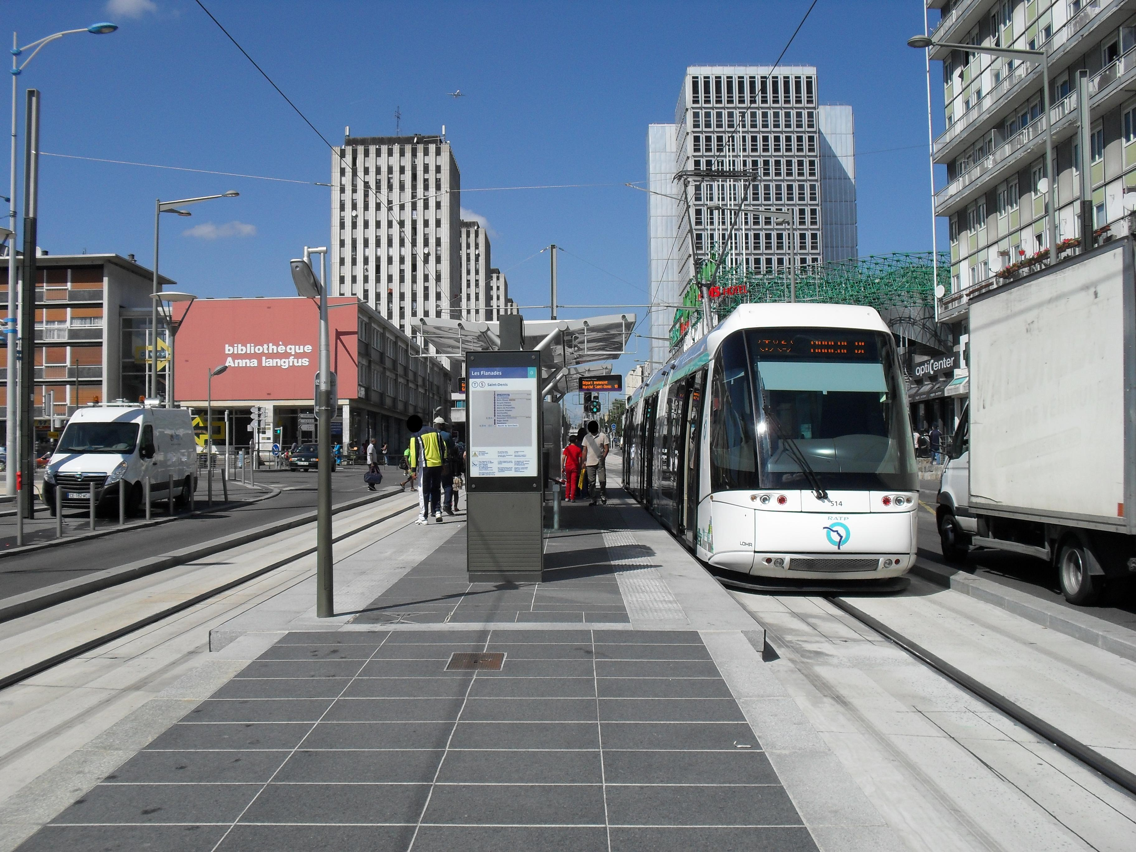 Une rame Translohr de la ligne T5 à la station "Les Flanades".